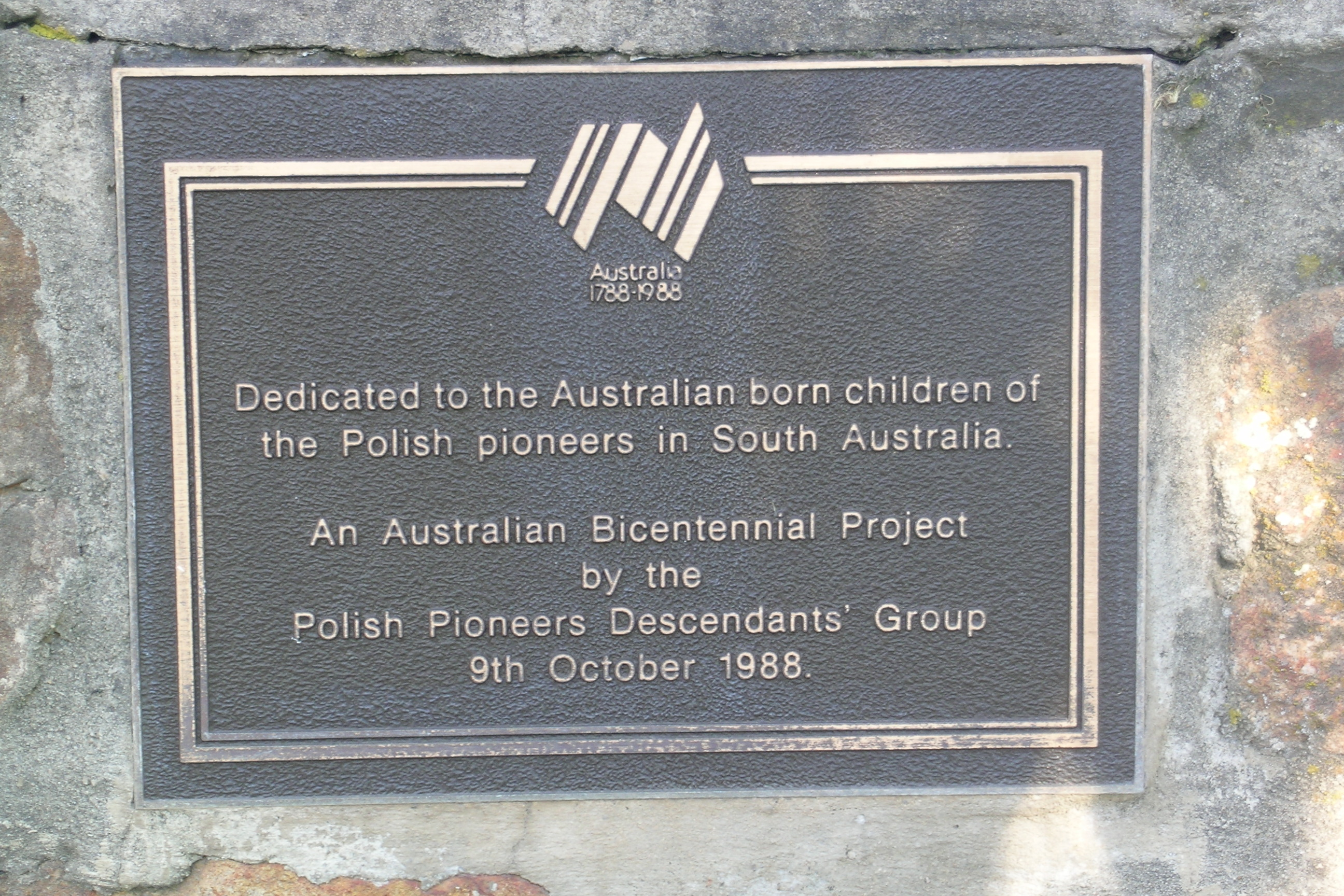 Dedykowane dla urodzonych w Australii dzieci polskich pionierów w Australii Południowej. Projekt z okazji dwuchsetlecia Australii zapoczątkowany przez Stowarzyszenie Potomków Polskich Pionierów, 9 października 1988.